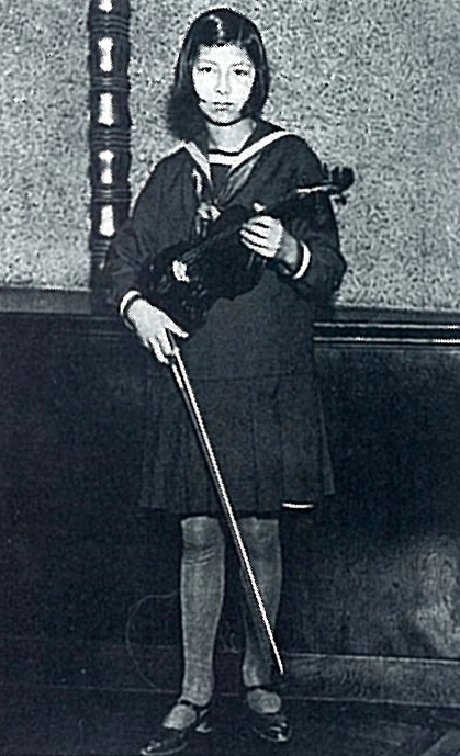 1932年（昭和7年）当時の諏訪根自子